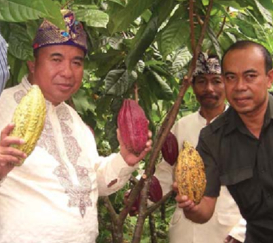 Kakao Felder Kepahiang